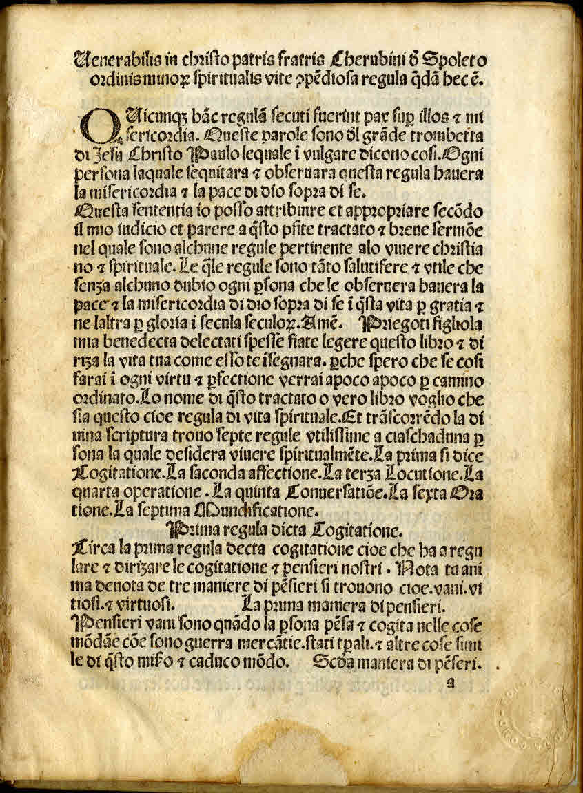 Regola della vita spirituale. - [Milano] : [Leonhard Pachel e Ulrich Scinzenzeler], [circa 1485]. - 24 c. ; a-f⁴ ; 4º.